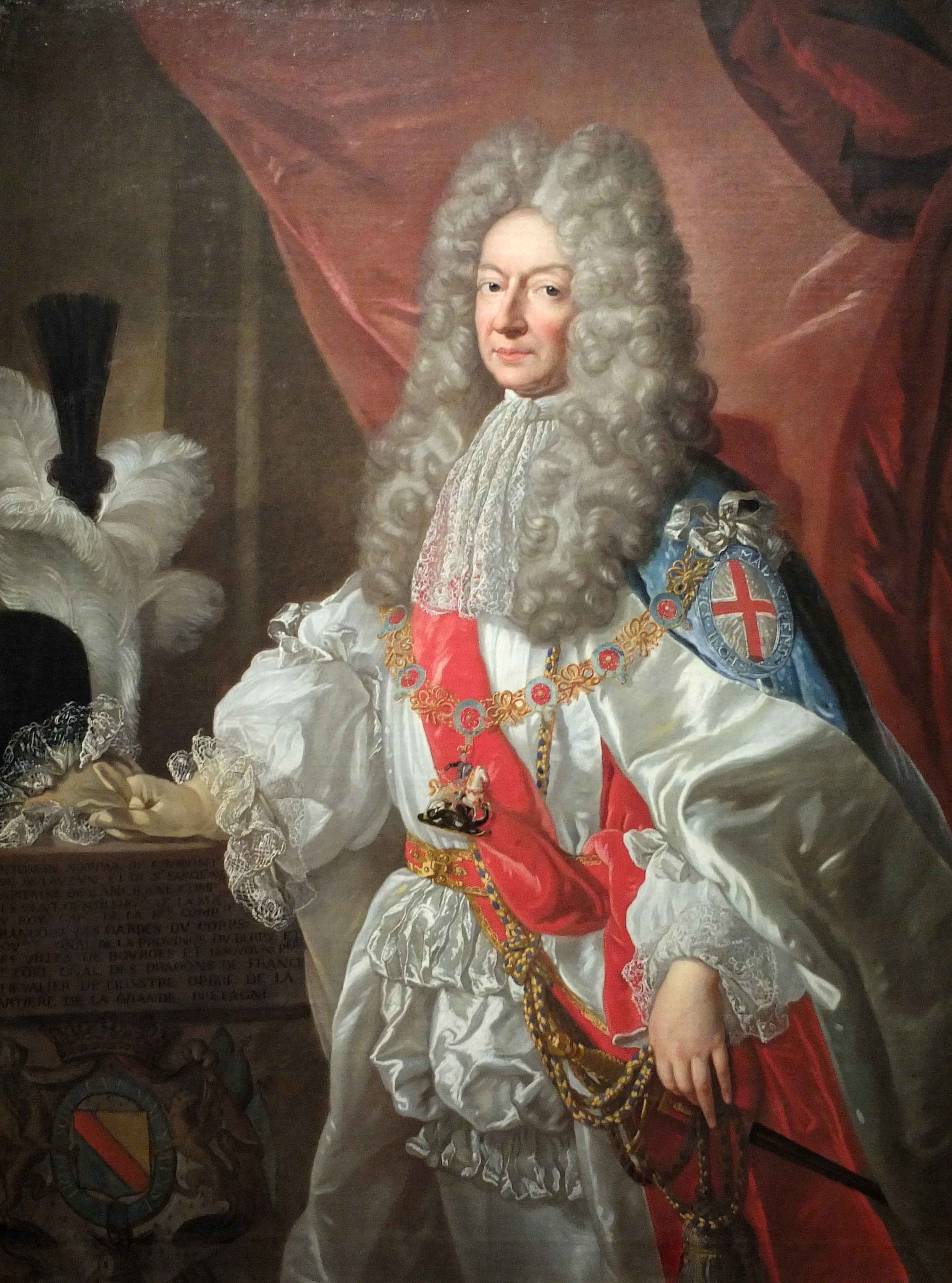 Portrait d'Antoine Nompar de Caumont, duc de de Lauzun. Exposition Les Mousquetaires, musée de l'Armée, Paris, exposition mai 2014. Conservation : Musée d'art et d'histoire de La Rochelle (Charente-Maritime).